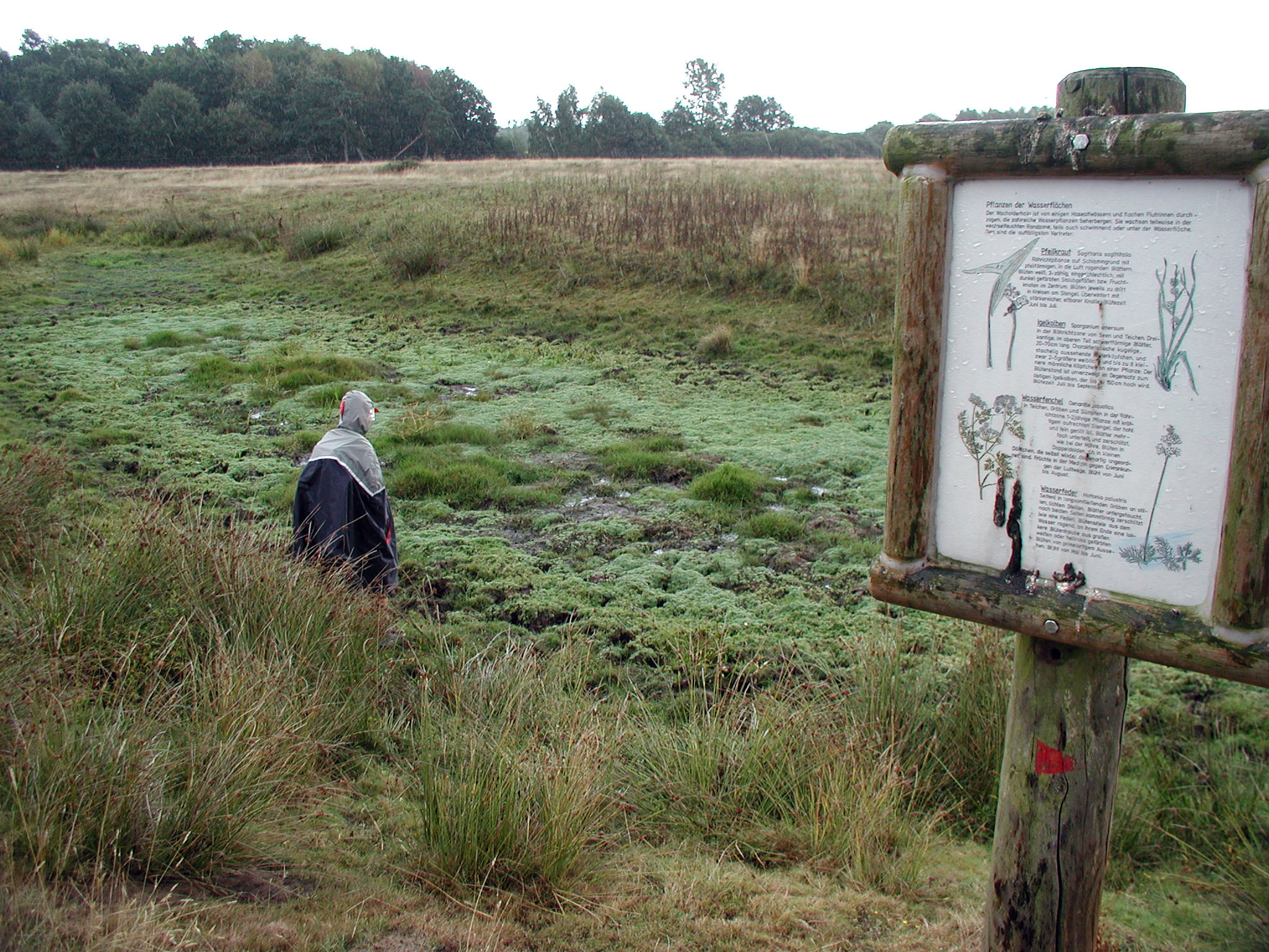 Haselünner Wacholderhain, Emsland